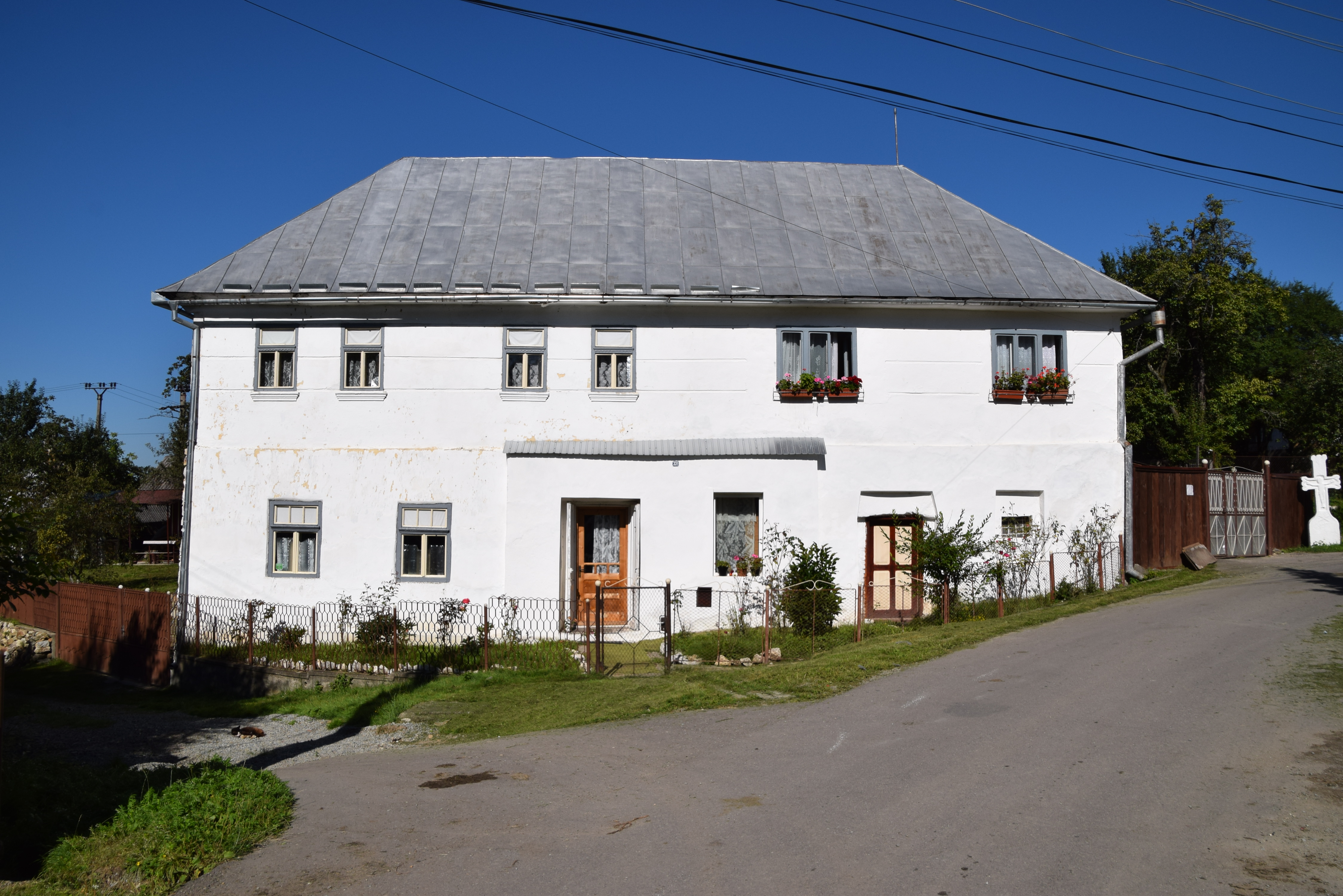 Casă, Roșia Montană nr. 331